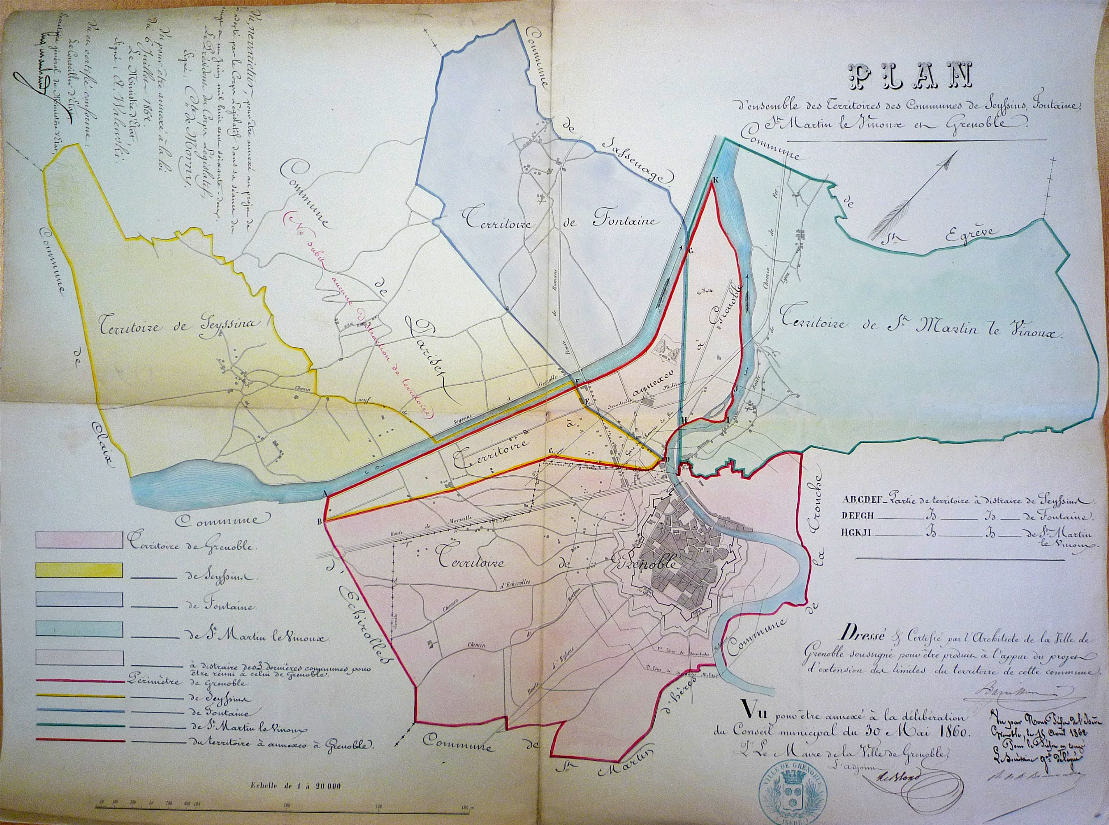 Terrains le long du Drac appartenant à Seyssins, Fontaine et St Martin le Vinoux qui vont être annexés à la ville de Grenoble par une loi du 6 juillet 1862.